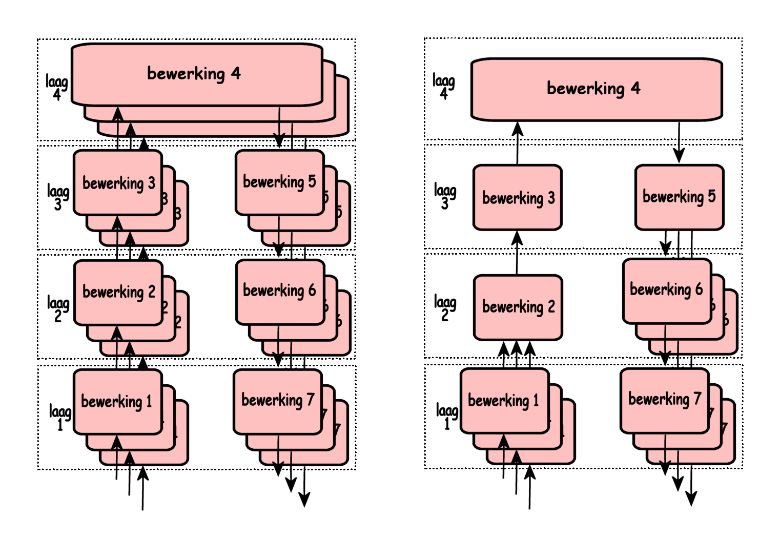 multiplexing van functies